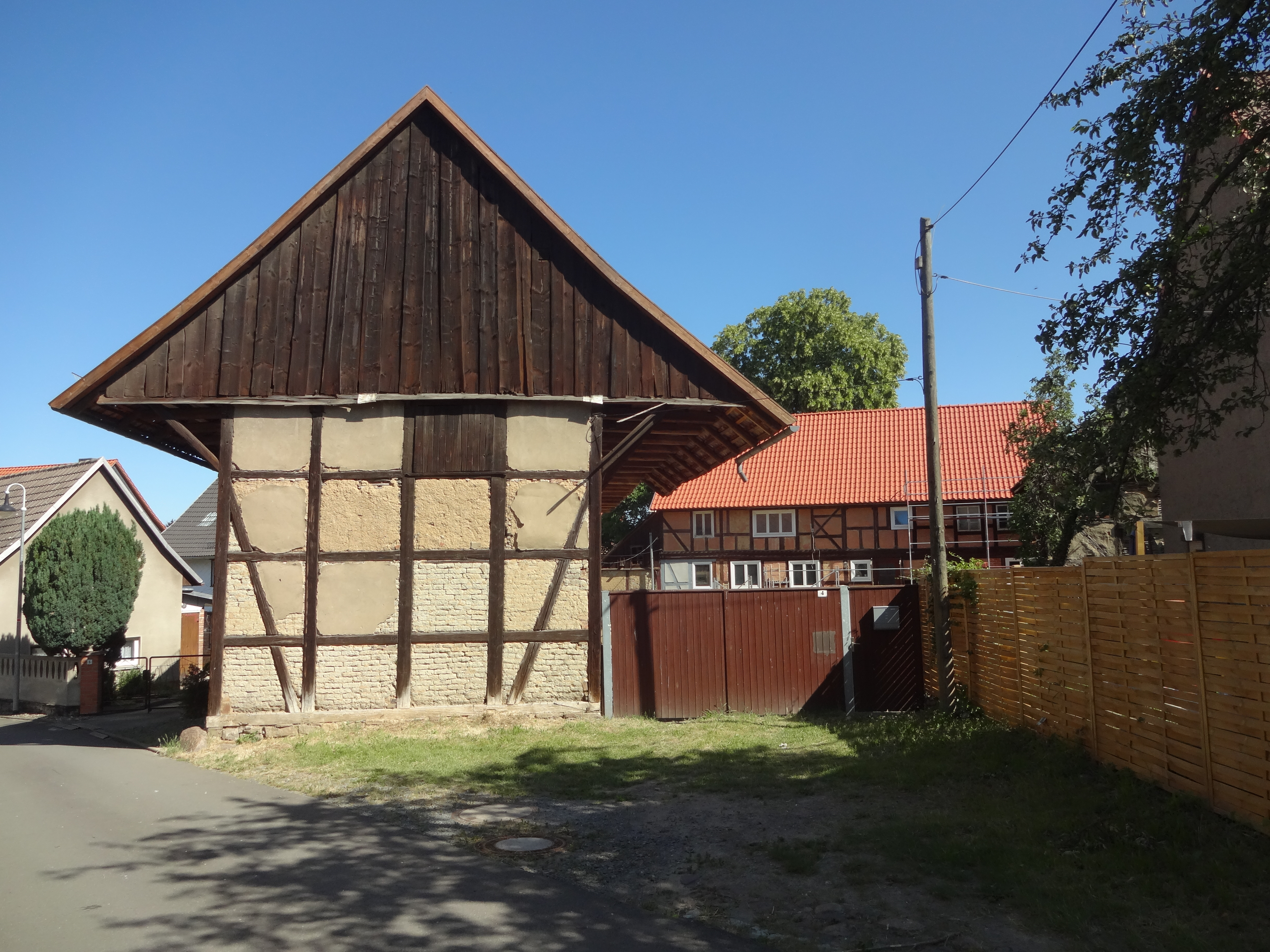 denkmalgeschützter Bauernhof in der Schmiedestraße 4 in Langeln, Gemeinde Nordharz